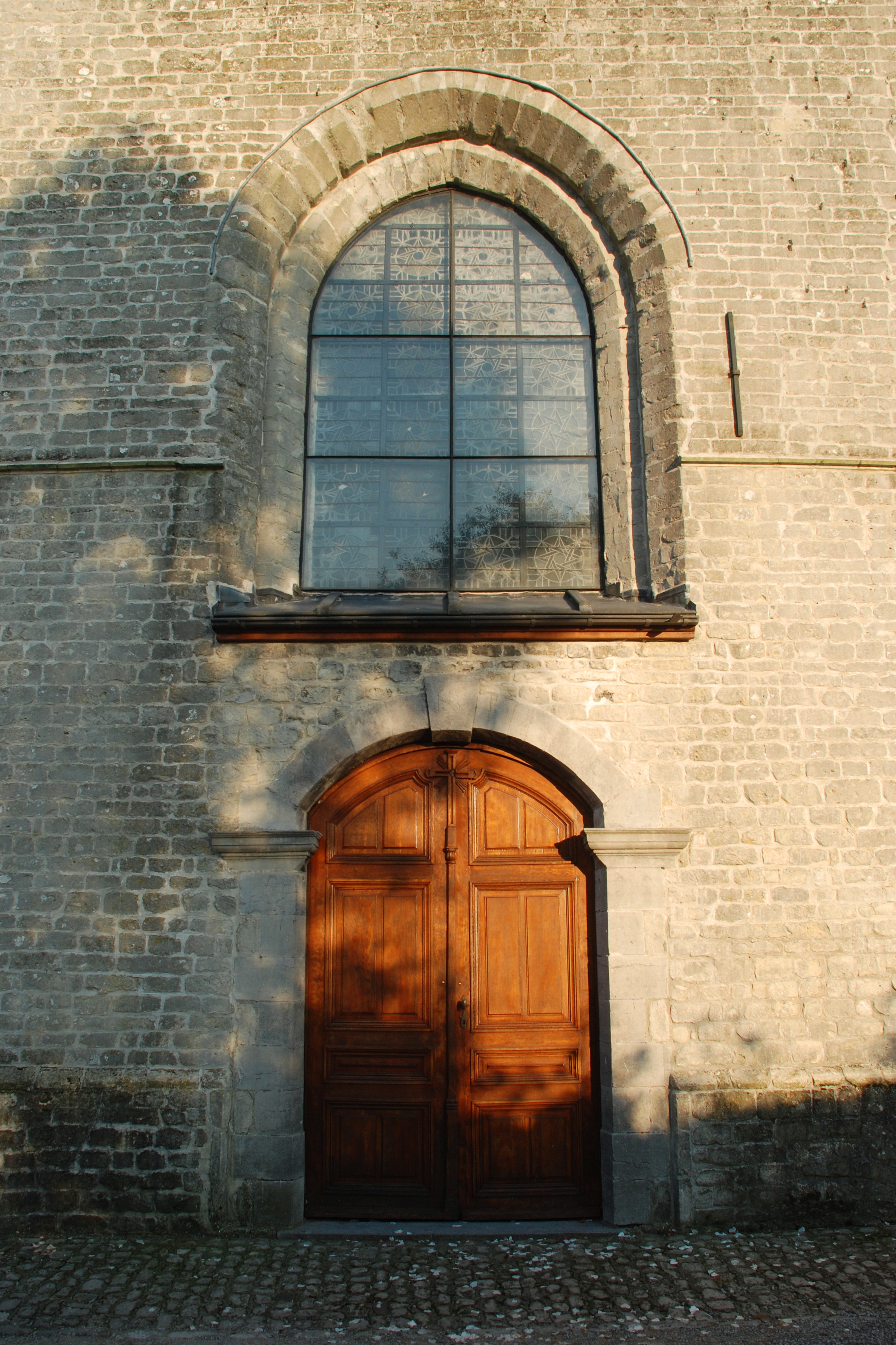 Belgique - Brabant Wallon - Lasne - Église Saint-Étienne d'Ohain